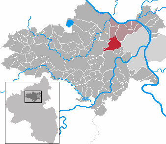 Gemeinde Bassenheim im Landkreis Mayen-Koblenz